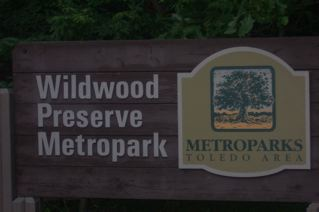 Wildwood Metropark Sign